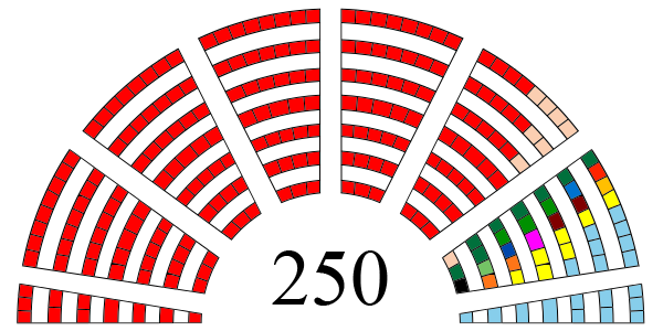 Parlamentarni izbori 1990 - raspodela mandata